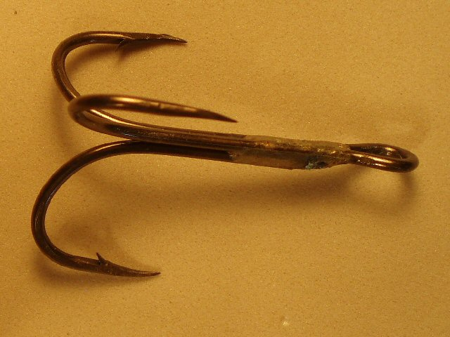 Large 4/0 Treble Hook